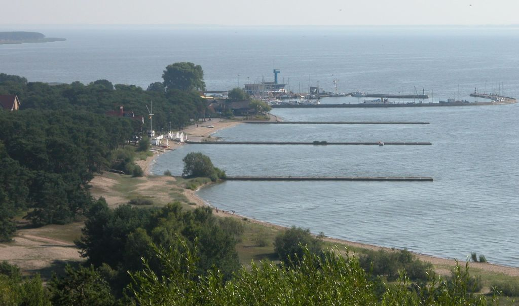 Kurische Nehrung: Hafen von Nidden